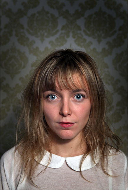 Vlaams actrice gebruik foto ovv Filip Naudts, cc-by-sa